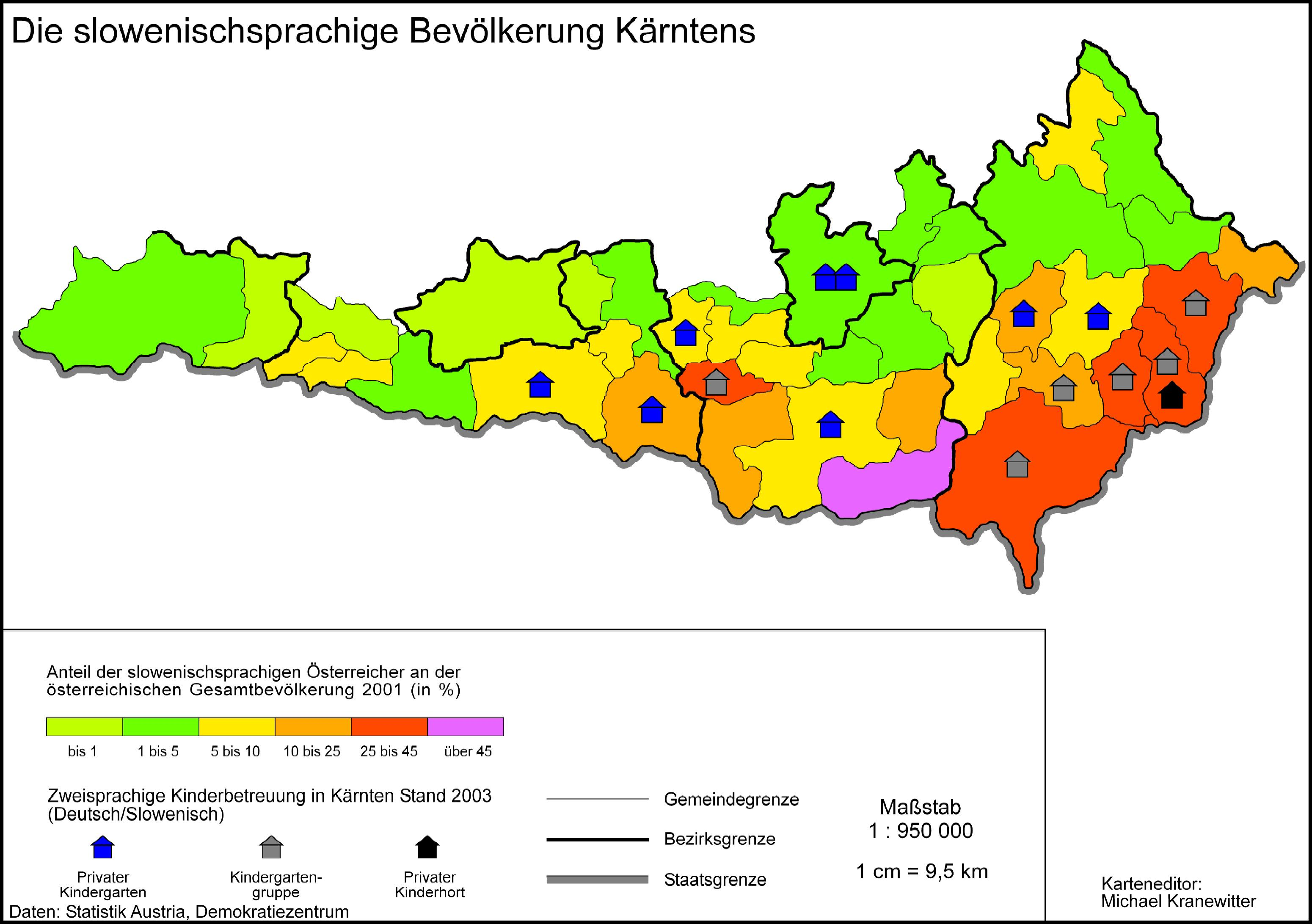 Anteil der slowenischsprachigen Bevölkerung Kärntens 2001 sowie Anzahl der slowenischsprachigen Kindergärten 2003